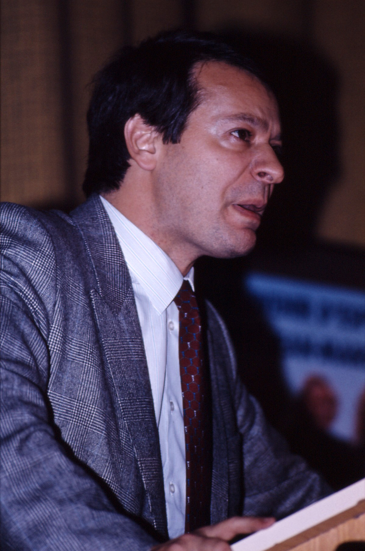 Jean-Pierre STIRBOIS au Palais des Congrès de Lyon, en 1984.